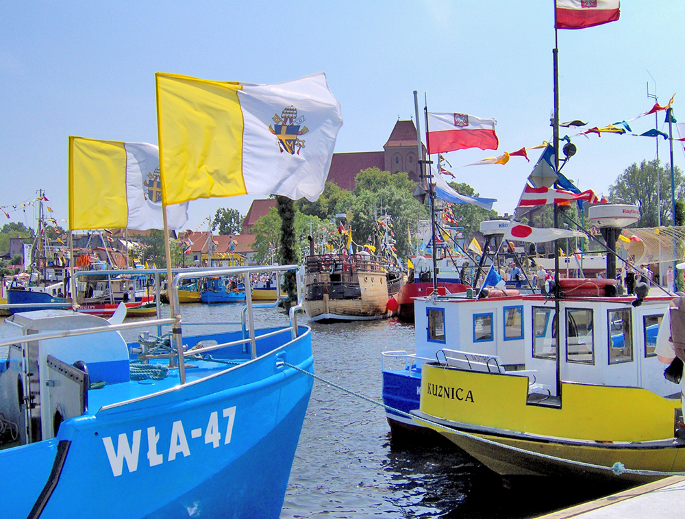 Pielgrzymka rybacka do Pucka - 25.06.2006 Pilgrimage of fishermen to Puck for a church fair, Poland, Bay of Puck, Baltic Sea, 25.06.2006 Autor: Krzysztof Data: Wysłane na polską Wikipedię 13 lipca 2006 r.